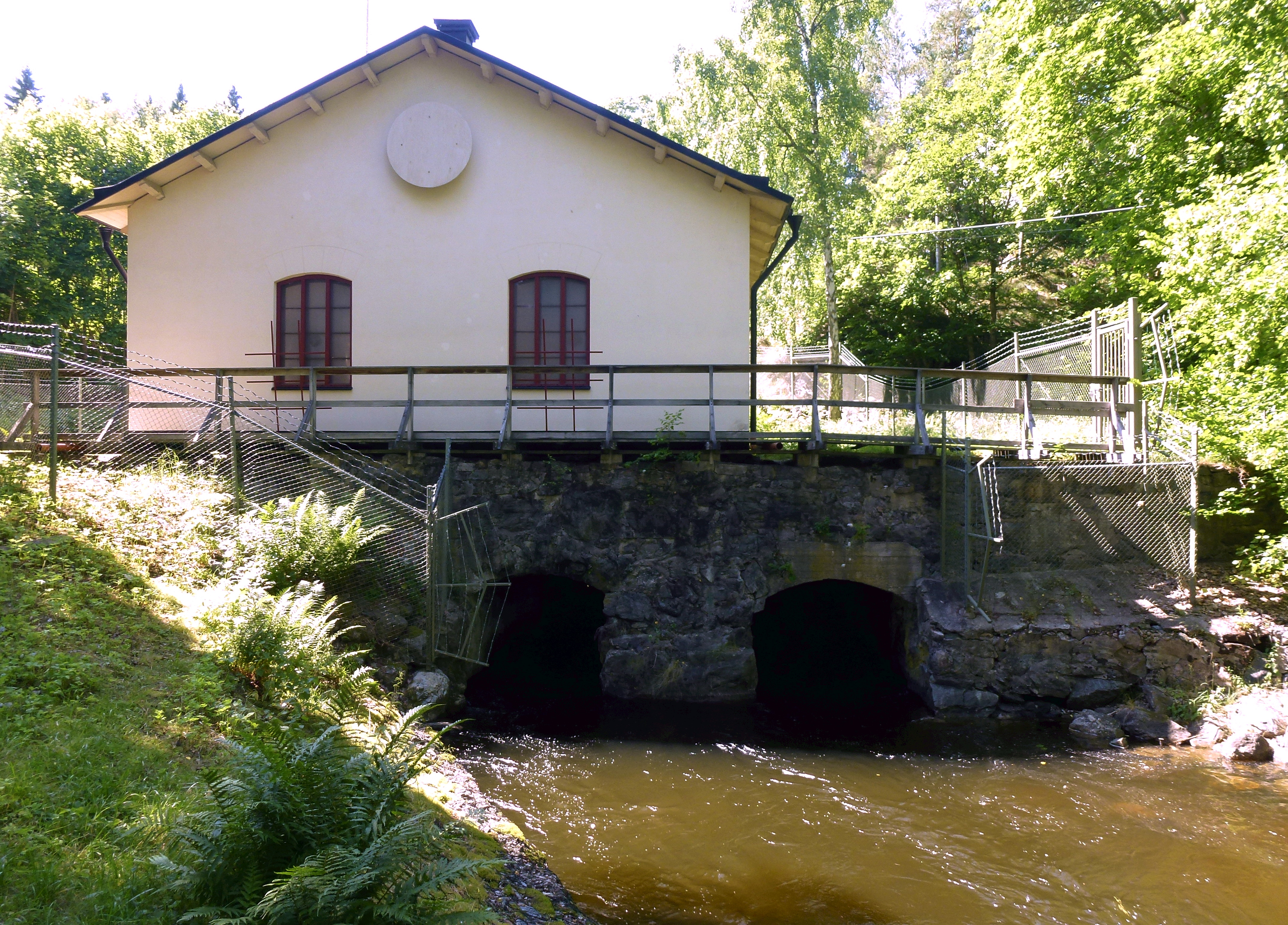 Ubbeby kvarn och kraftstation